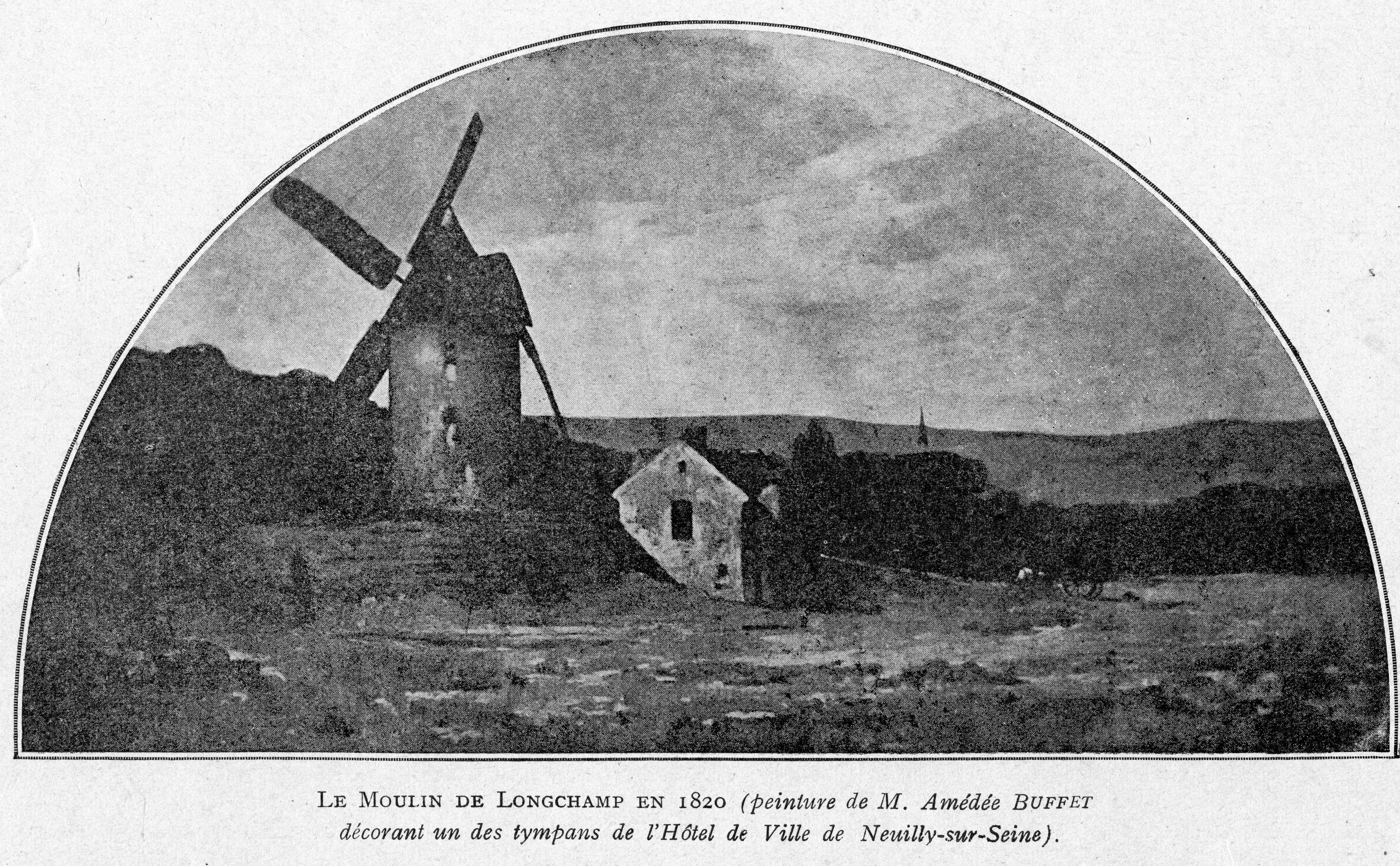 Corbel008 Le moulin de Longchamp en 1820 (peinture de M. Amédée Buffet décorant un des tympans de l'Hôtel de Ville de Neuilly-sur-Seine)